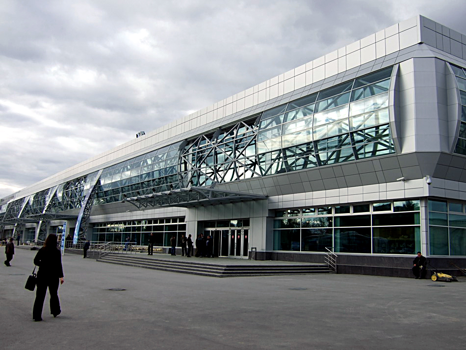 Новосибирский аэропорт Толмачёво